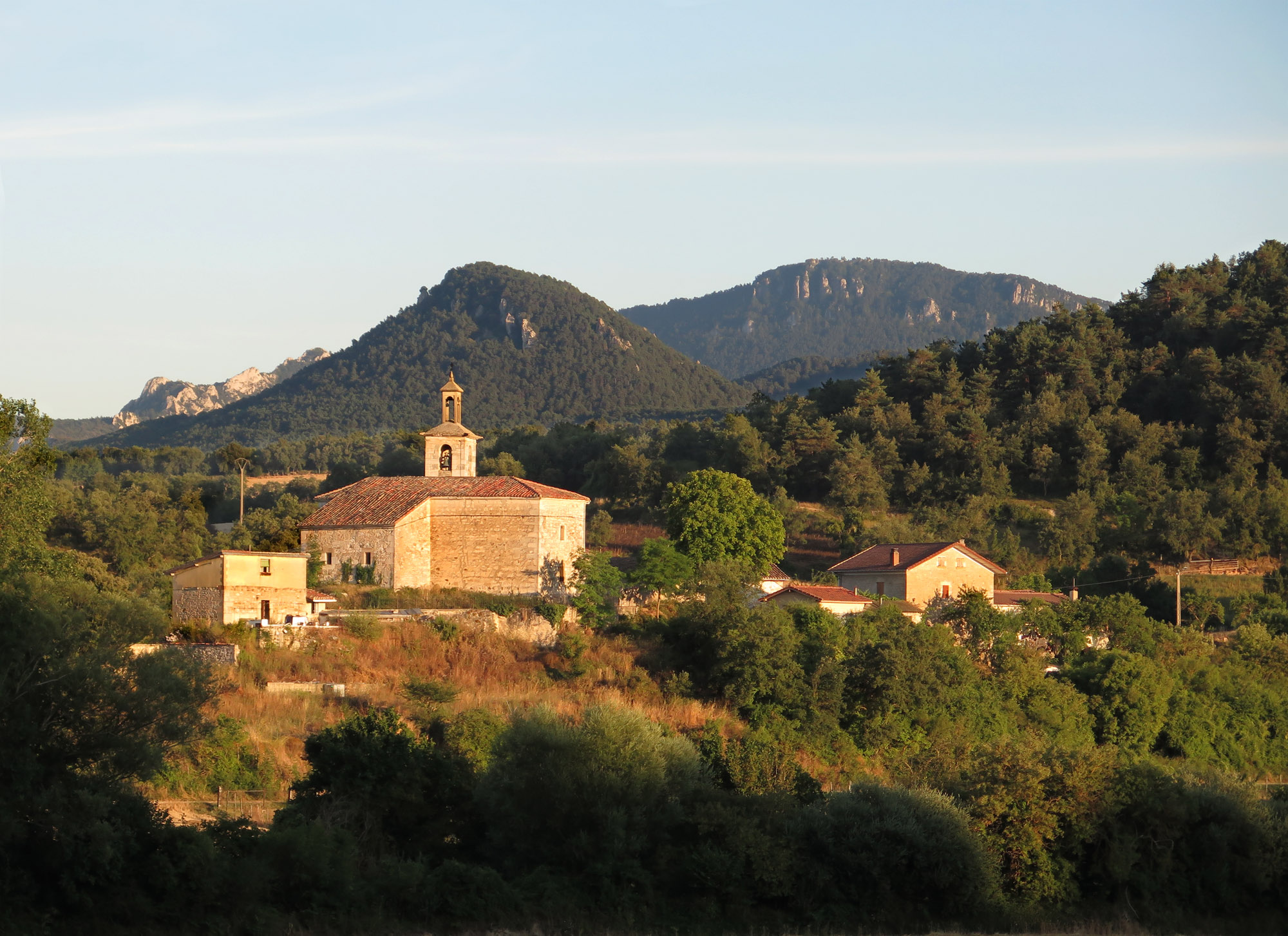 Barrio Medio e Iglesia de San Miguel de Gurendes, en el municipio vasco de Valdegovía (Álava, España)